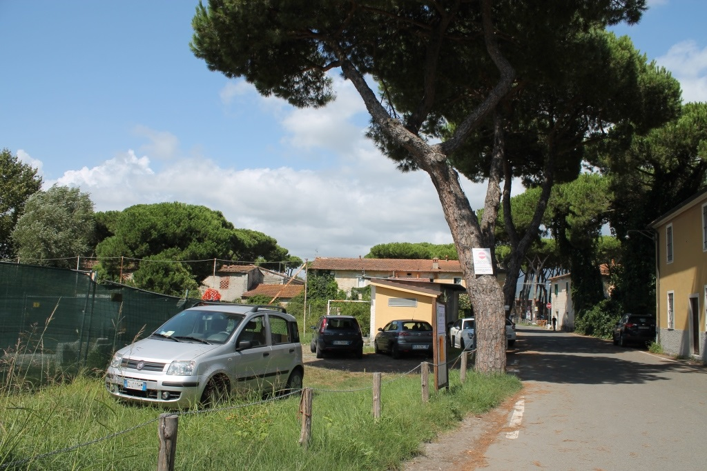 19038 Marinella di Sarzana SP, Italy